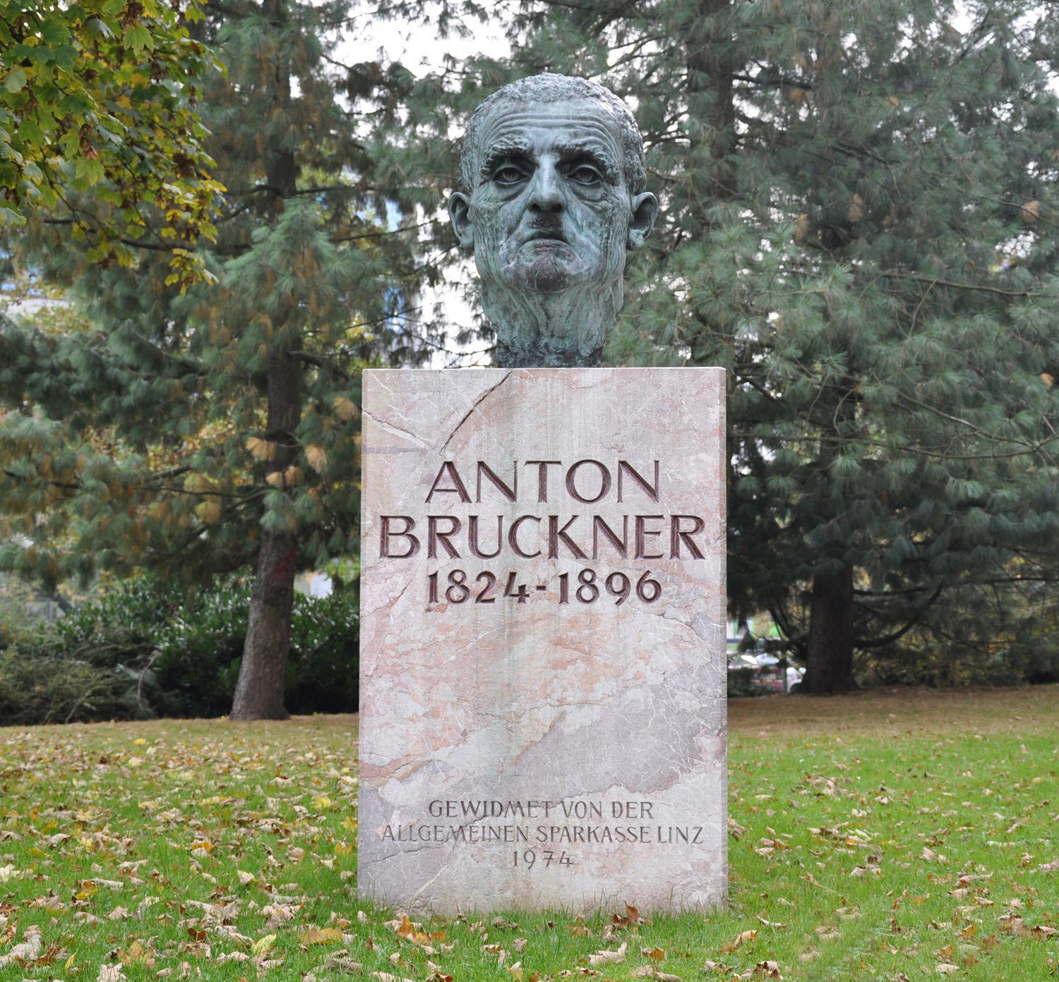 Anton-Bruckner-Büste